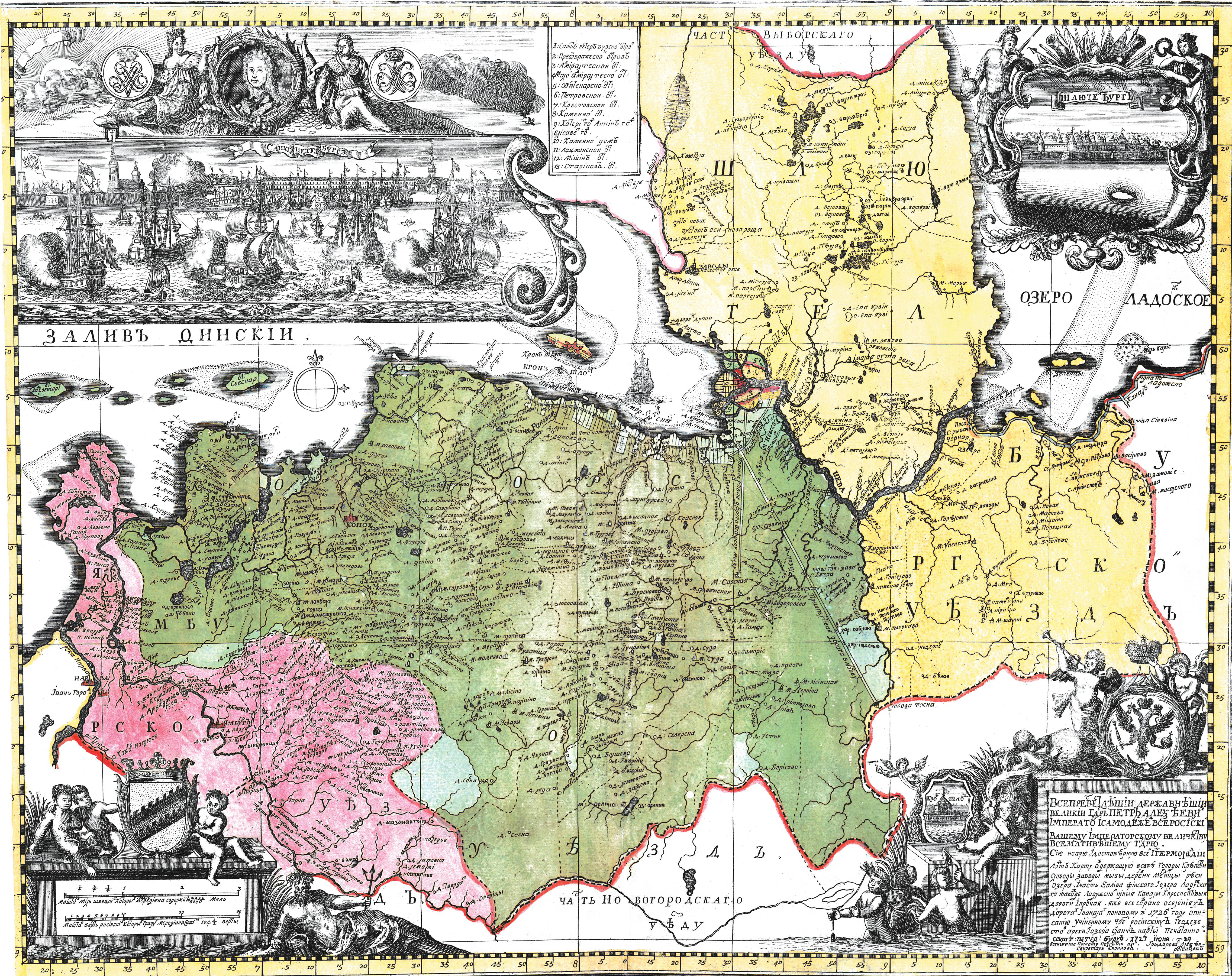 Ингерманландия из «Атласа Всероссийской империи» И. К. Кириллова. 1722-1737